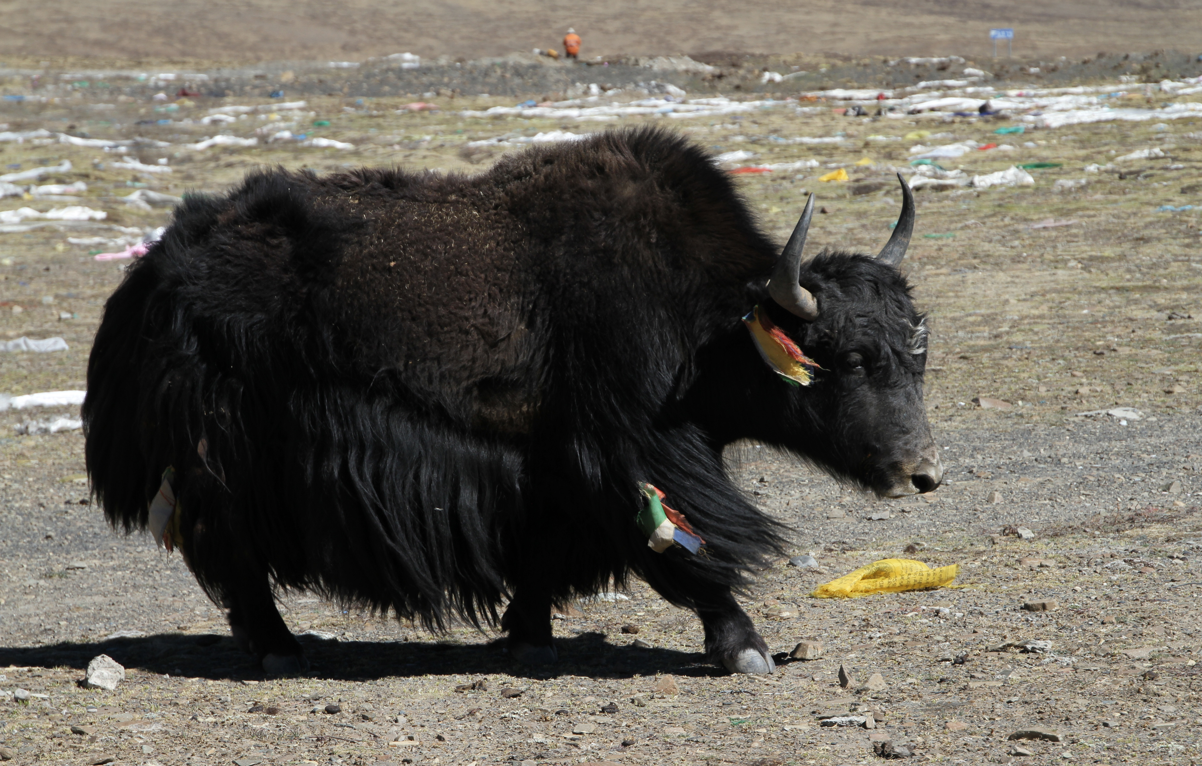 Yak am Gyatso La in Tibet